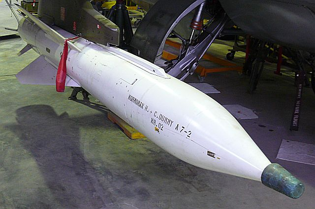 AS.34 Kormoran, eigenes Bild